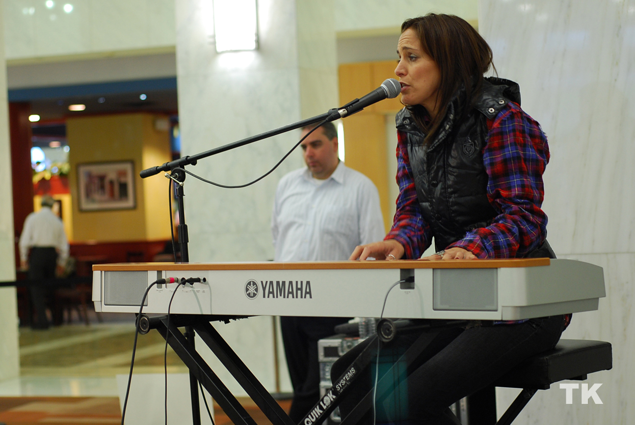 Chantal Kreviazuk at Busking For Change 2009